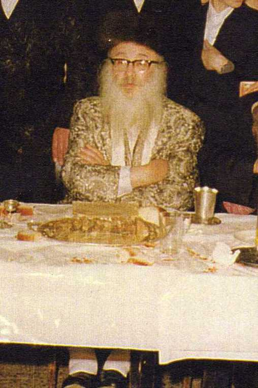 רבי יעקב יוסף ווייס מספינקא